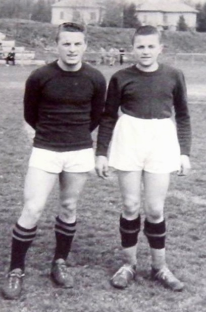 I calciatori Francesco e Pietro Dalio con la maglia dell'AC Gozzano negli anni 1940